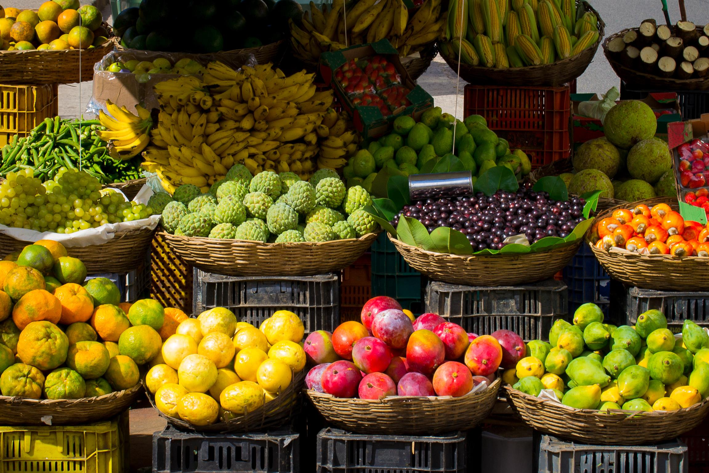 Fruit baskets